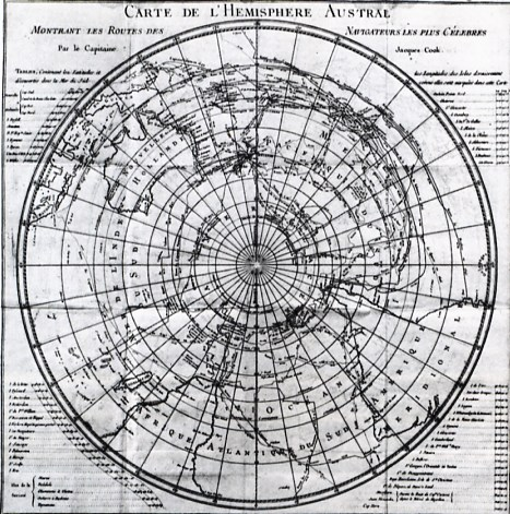 James Cook: Carte de l'Hemispheere Austral Montrant les Routes des Navigateurs les plus Cèlebres...'S Gravenhage 1780 535 x 540 mm